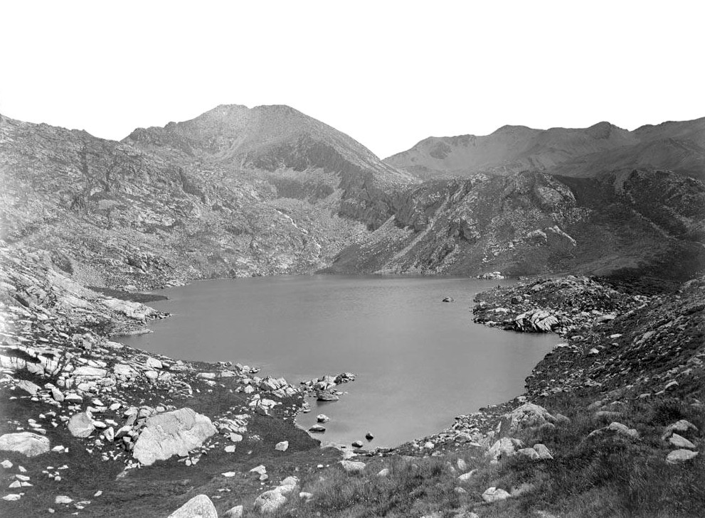 Imatge